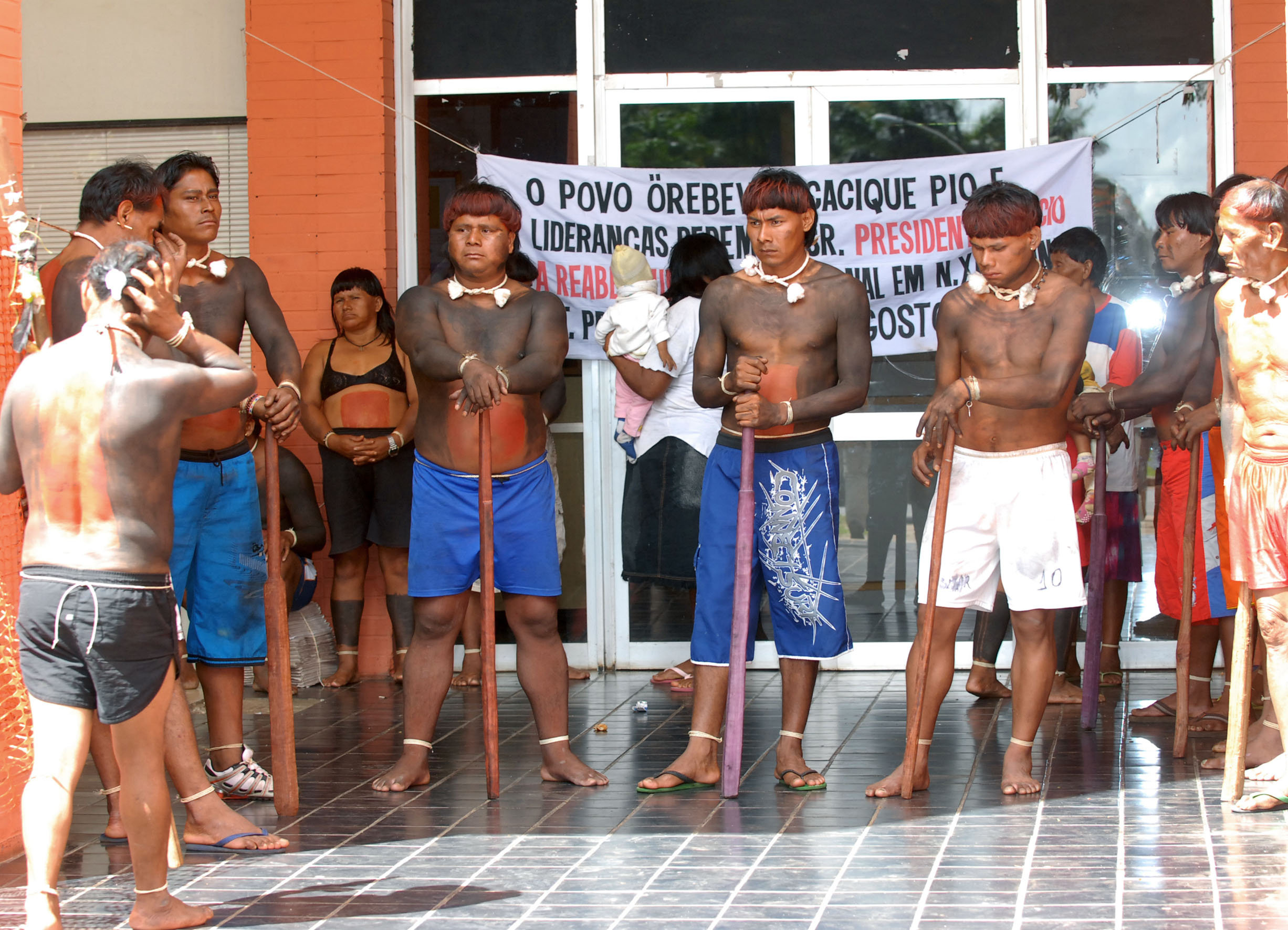 Brasília - Um grupo de índios Xavante, a maioria crianças, mulheres e idosos, impediu os funcionários da Fundação Nacional do Índio (Funai) de entrar no prédio para trabalhar. Eles pedem a reabertura do posto da Funai em Xavantina, no Mato Grosso.